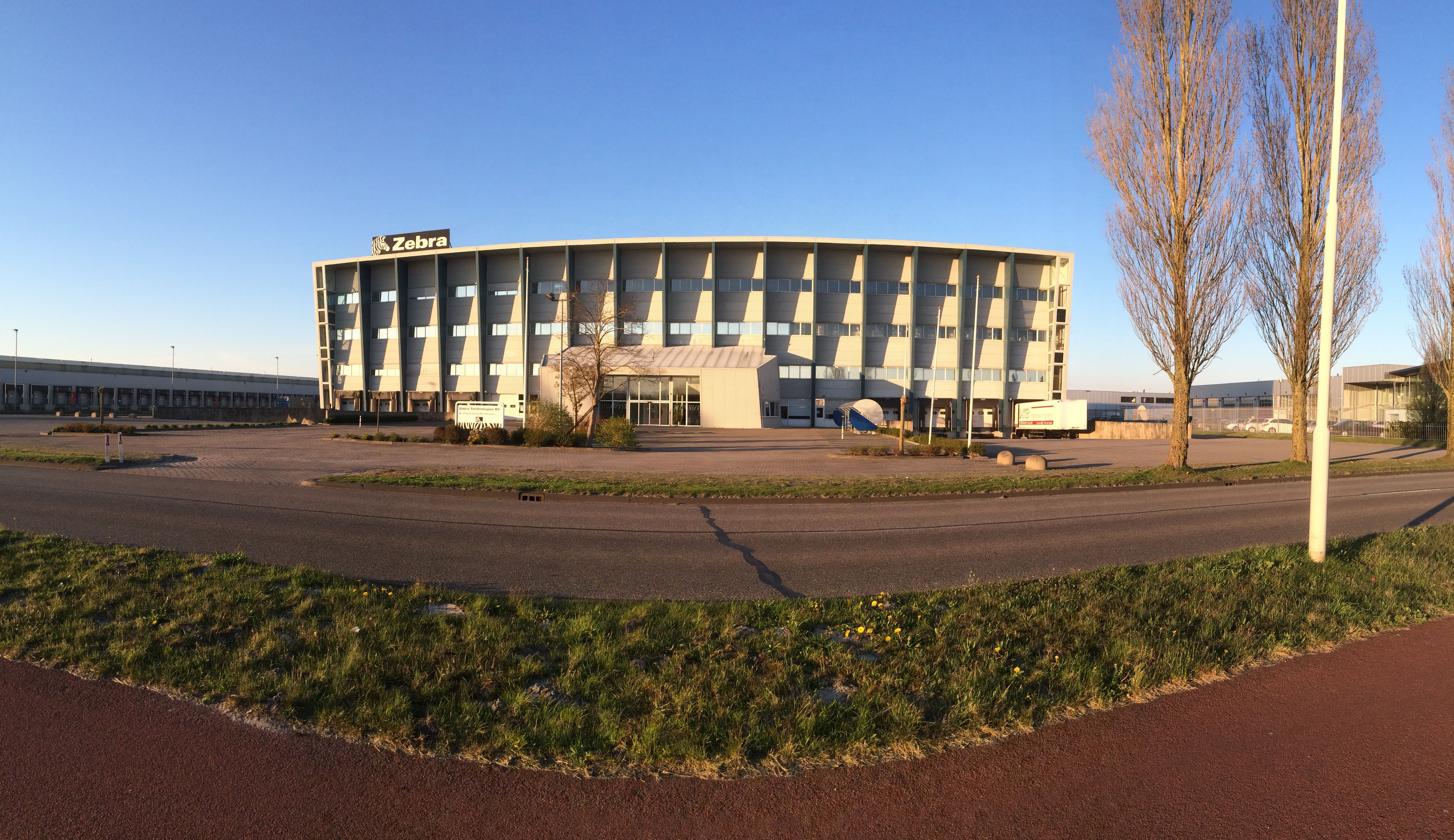 Zebra Technologies aan de Mercurius 12 in Heerenveen.